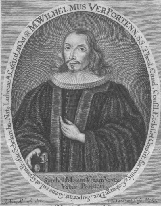 Porträtkupferstich Wilhelm Verpoorten